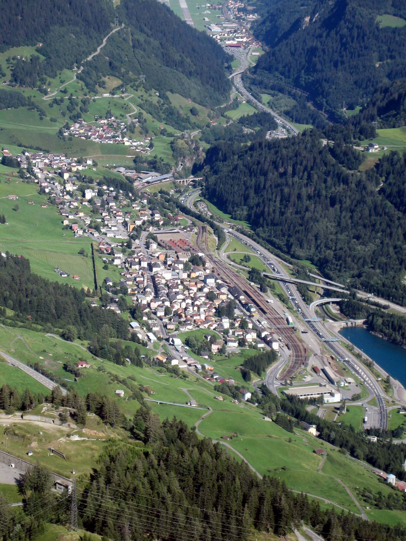 Airolo